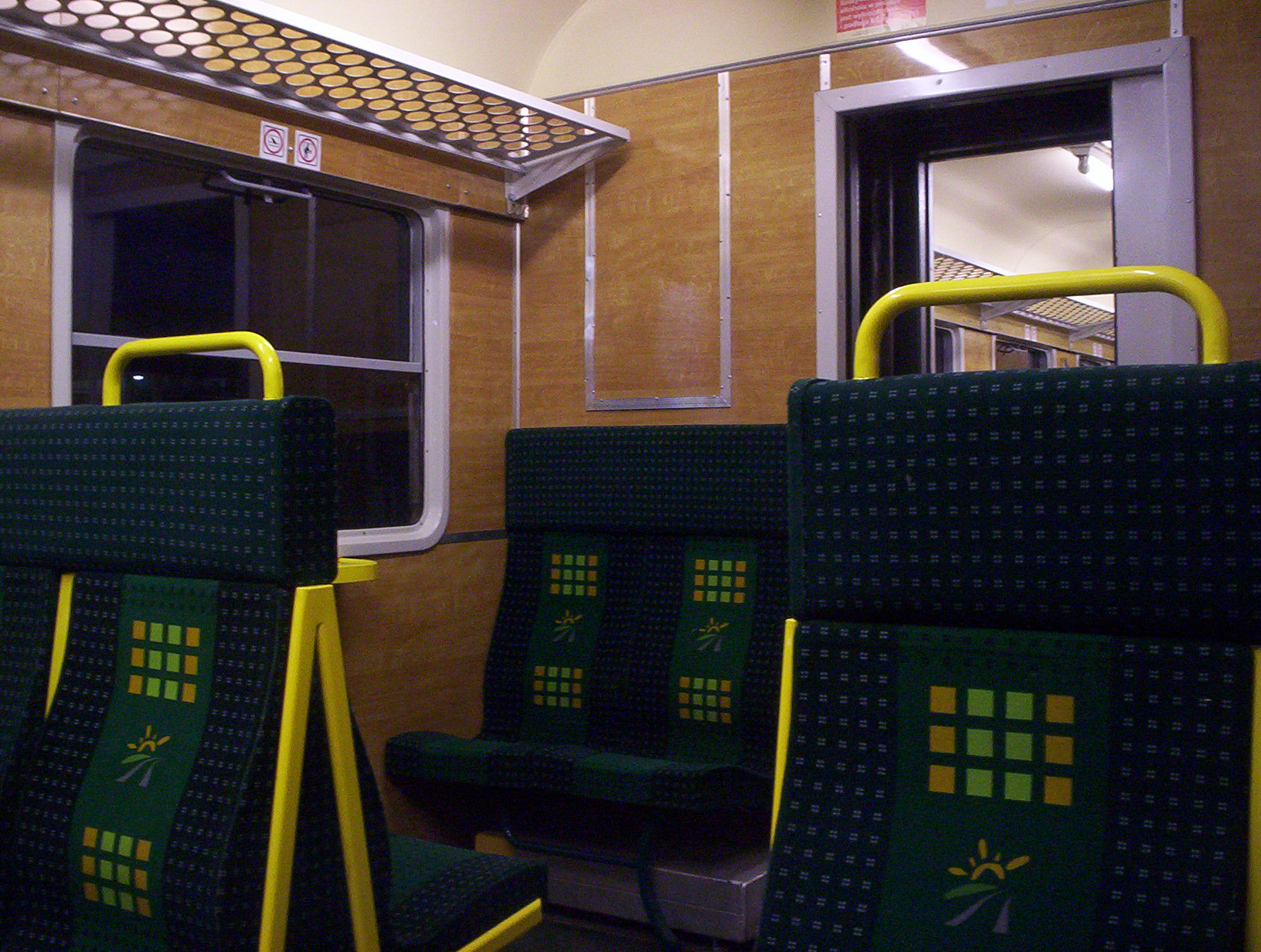 Wnętrze EN57 Kolei Mazowieckich